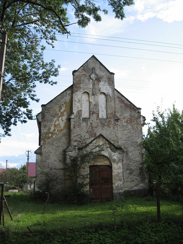 Римо-католицький костьол. Побудований поляками Мшани 1904 року